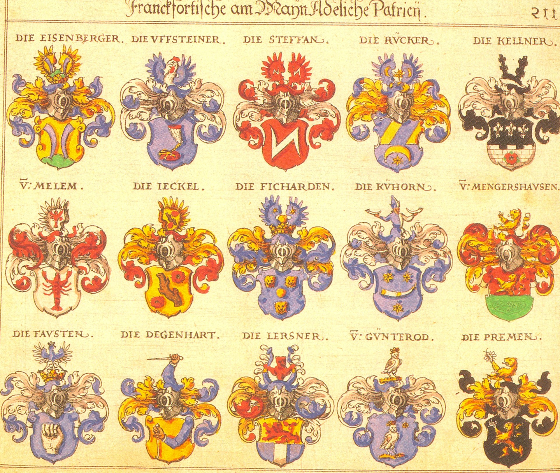 Johann Siebmacher: New Wappenbuch eingescannt aus: Horst Appuhn (Hrsg.), Johann Siebmachers Wappenbuch. Die bibliophilen Taschenbücher 538, 2. verb. Aufl , Dortmund 1989 Patrizier und Adel Frankfurt am Main Blatt 211